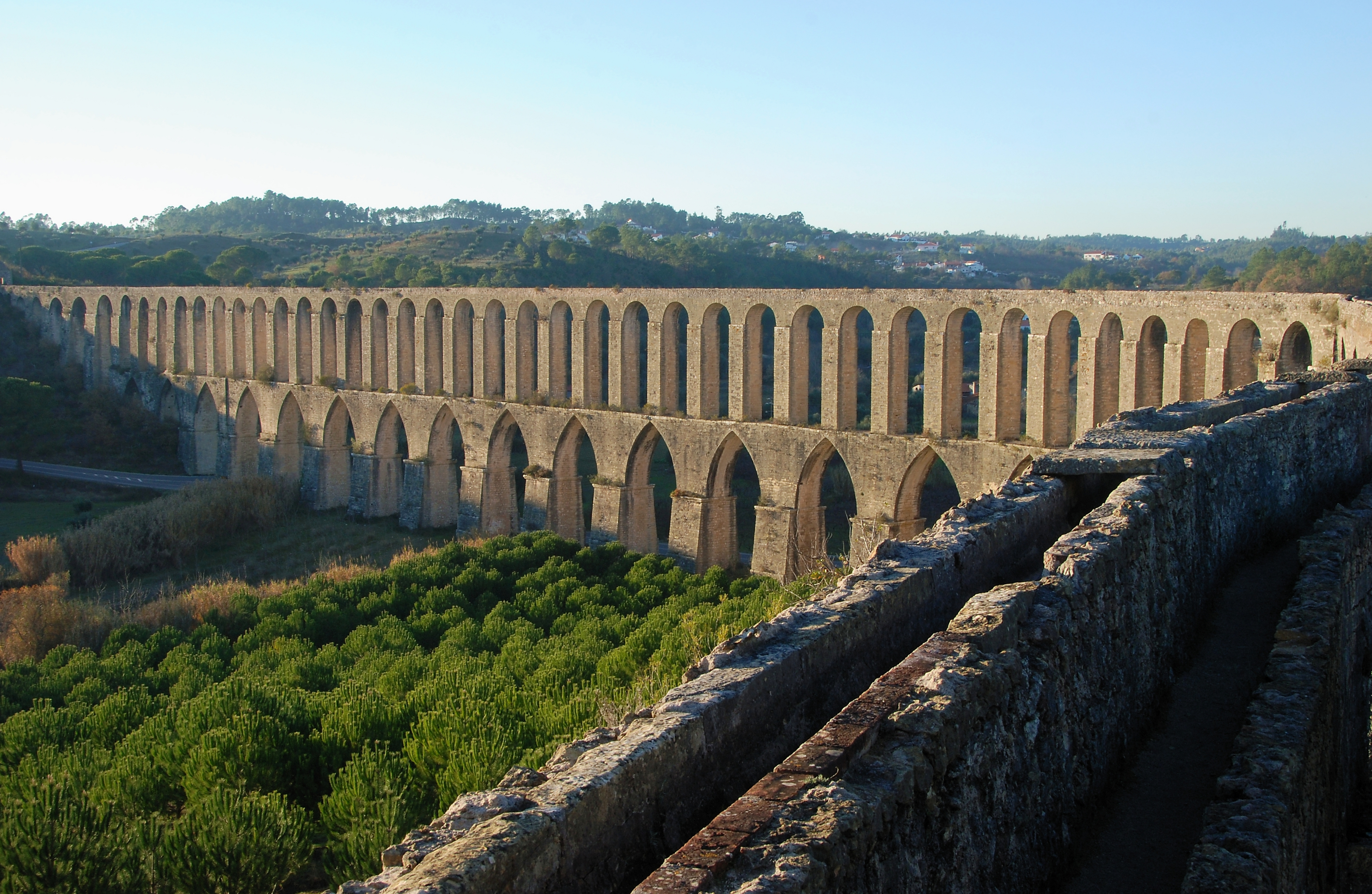 Aqueduct of Pegões, Tomar, Portugal